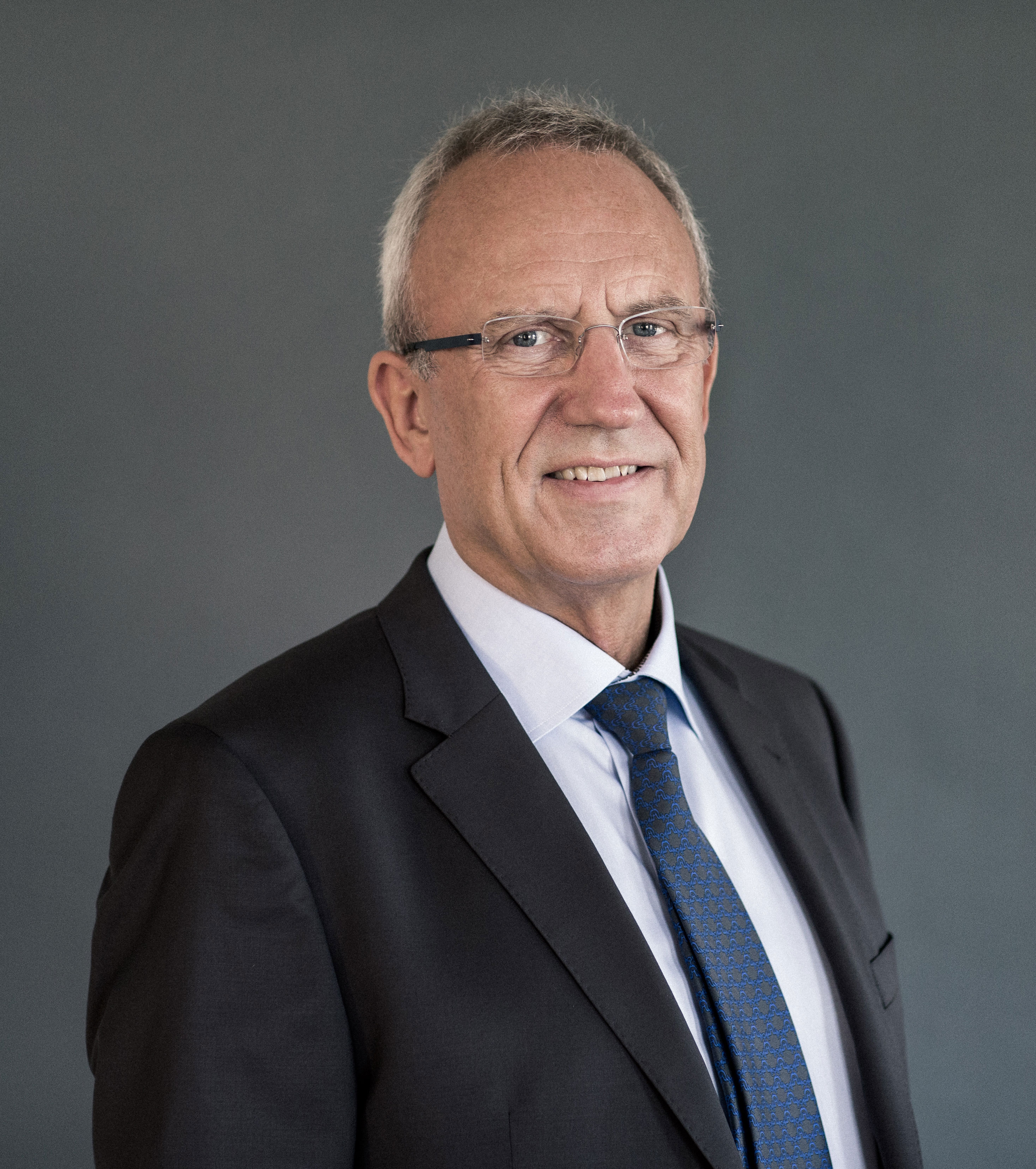 Officielt pressebillede af Jørn Neergaard Larsen